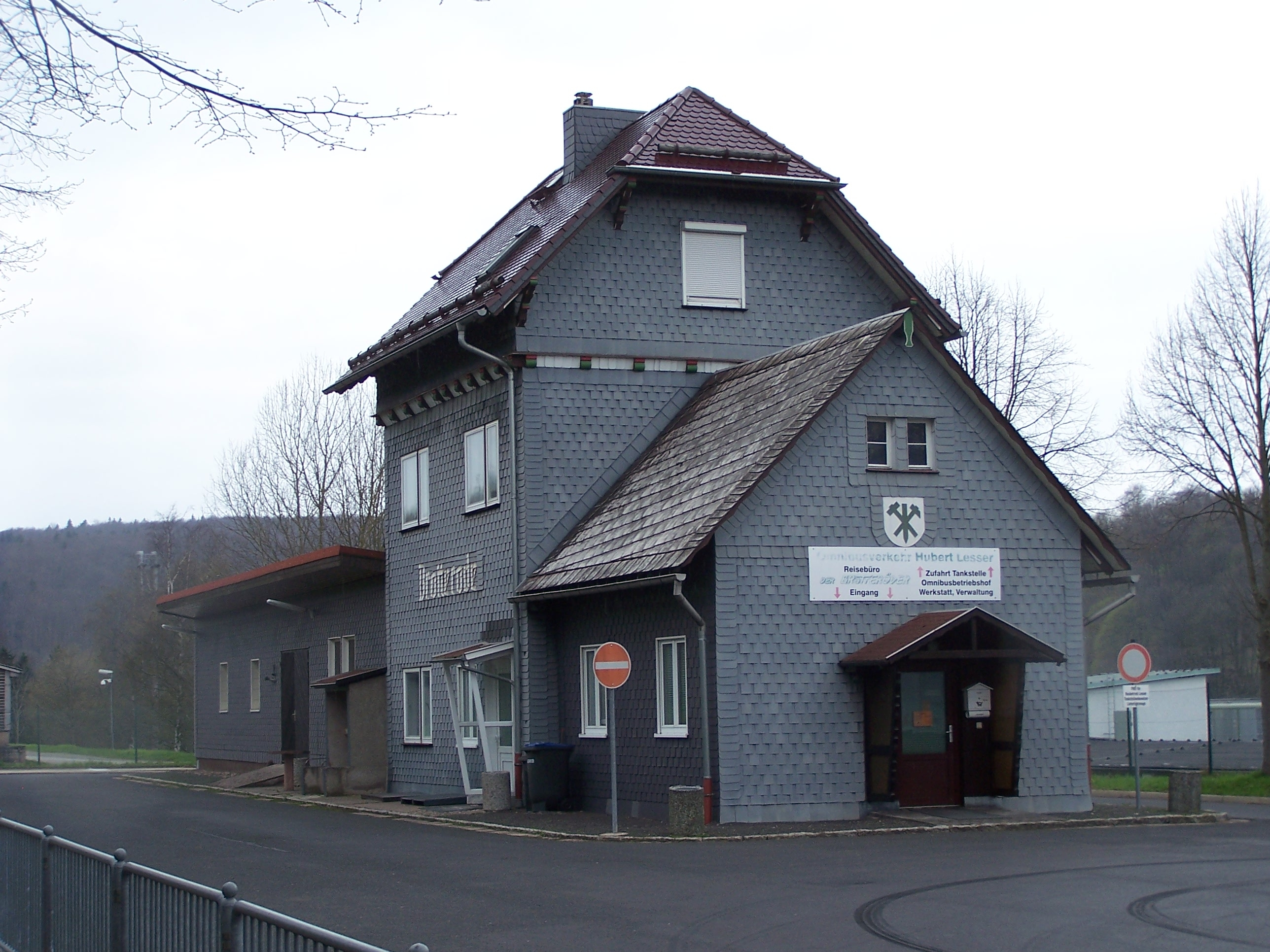 Der noch erhalten gebliebene Gebäudekomplex vom Bahnhof in Brotterode.